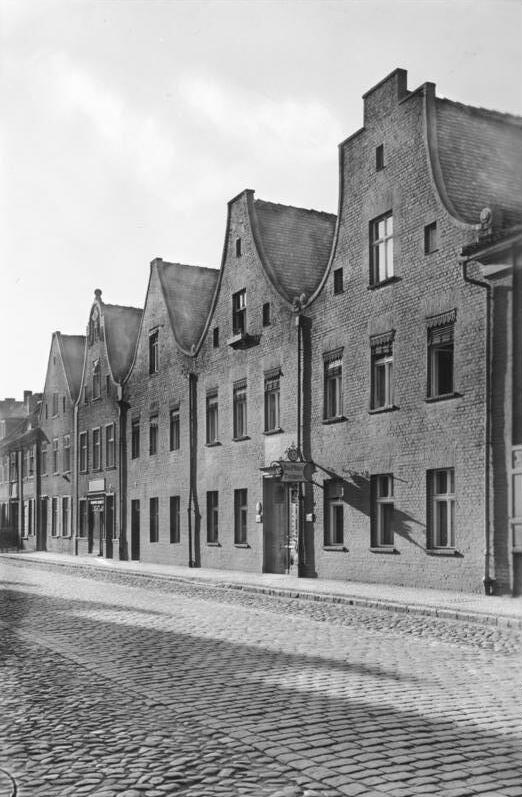 Potsdam.- Holländisches Viertel